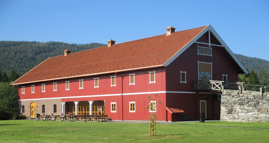 Låvekirken i Heddal